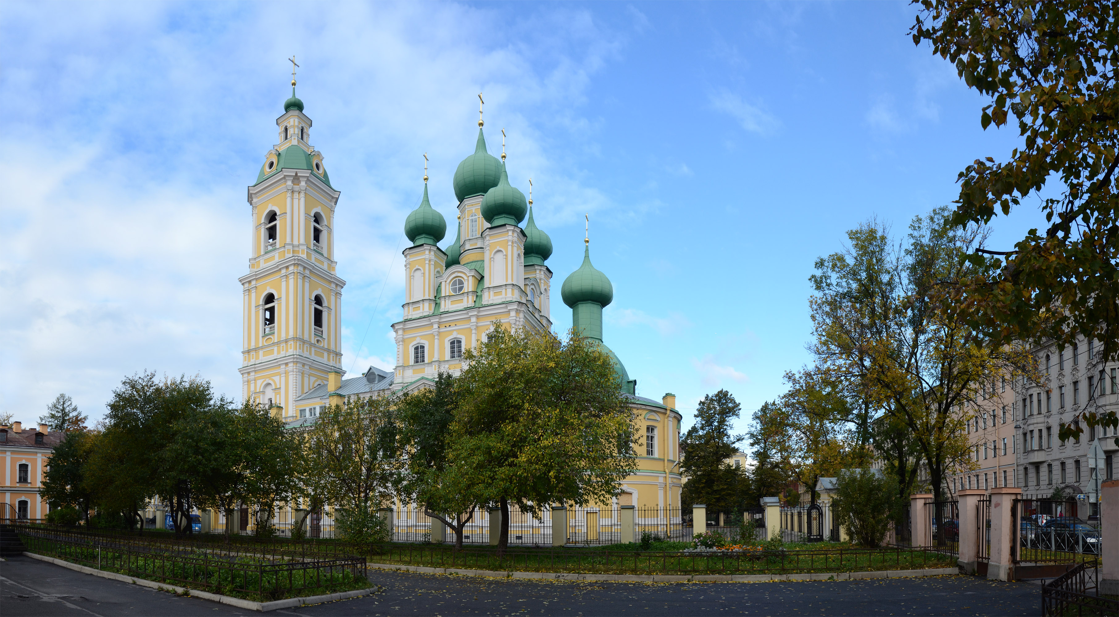 Церковь Благовещения Пресвятой Богородицы (Санкт-Петербург и Лен.область, Санкт-Петербург, 8-я линия Васильевского острова, 67, 71, 7-я линия Васильевского острова, 68, Малый проспект Васильевского острова, между домами 18 и 20)